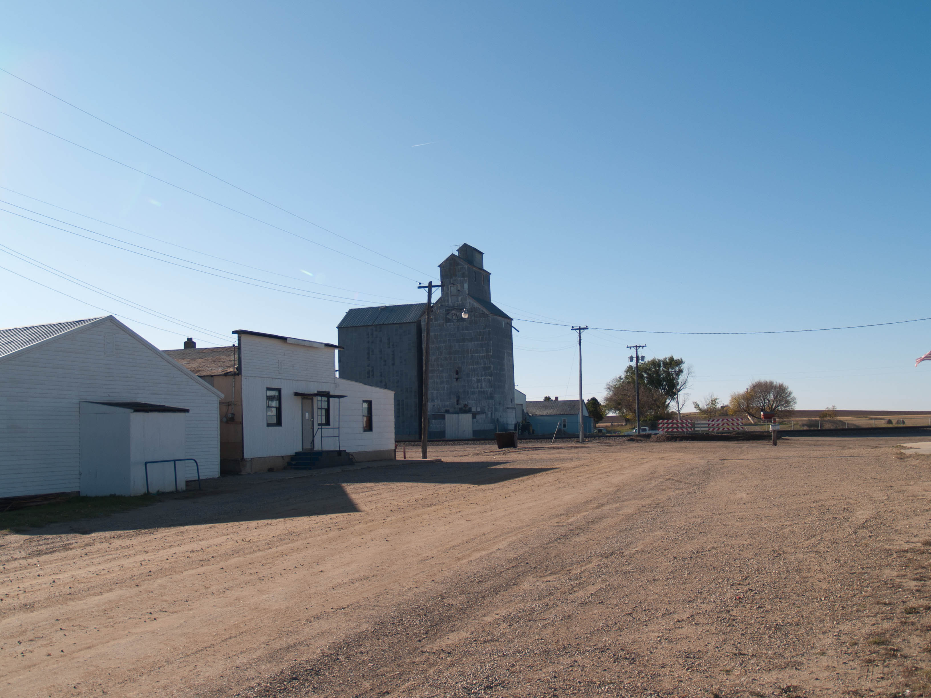 Selz, North Dakota